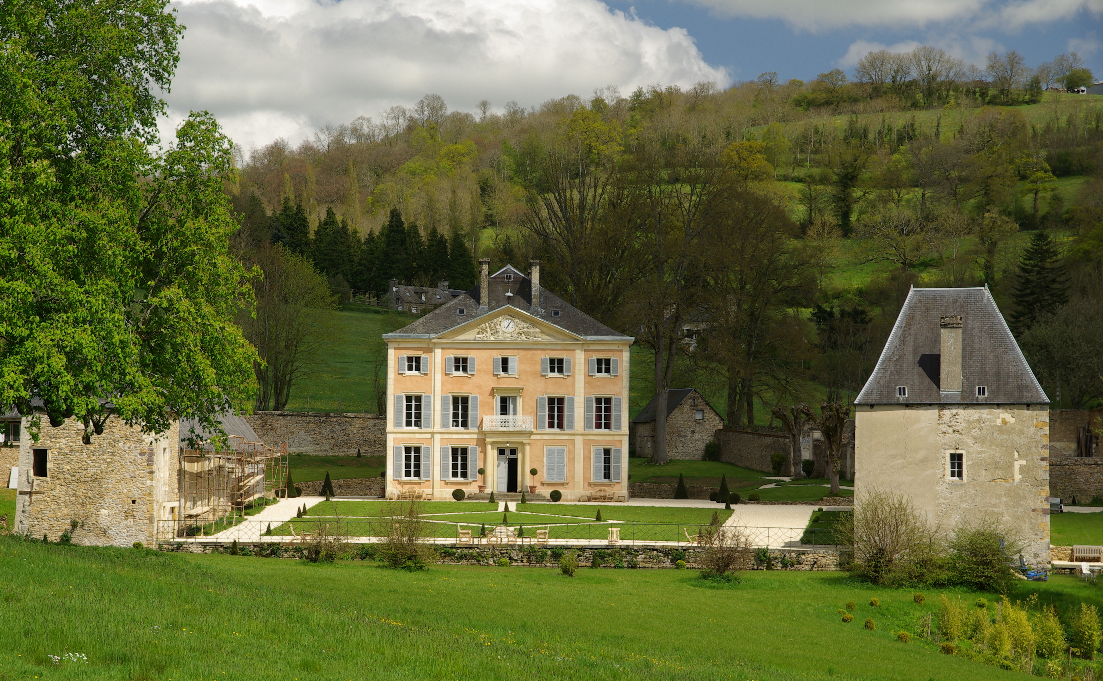 Le chateau de La Pommeraye, Template:XVe siècle, Calvados.